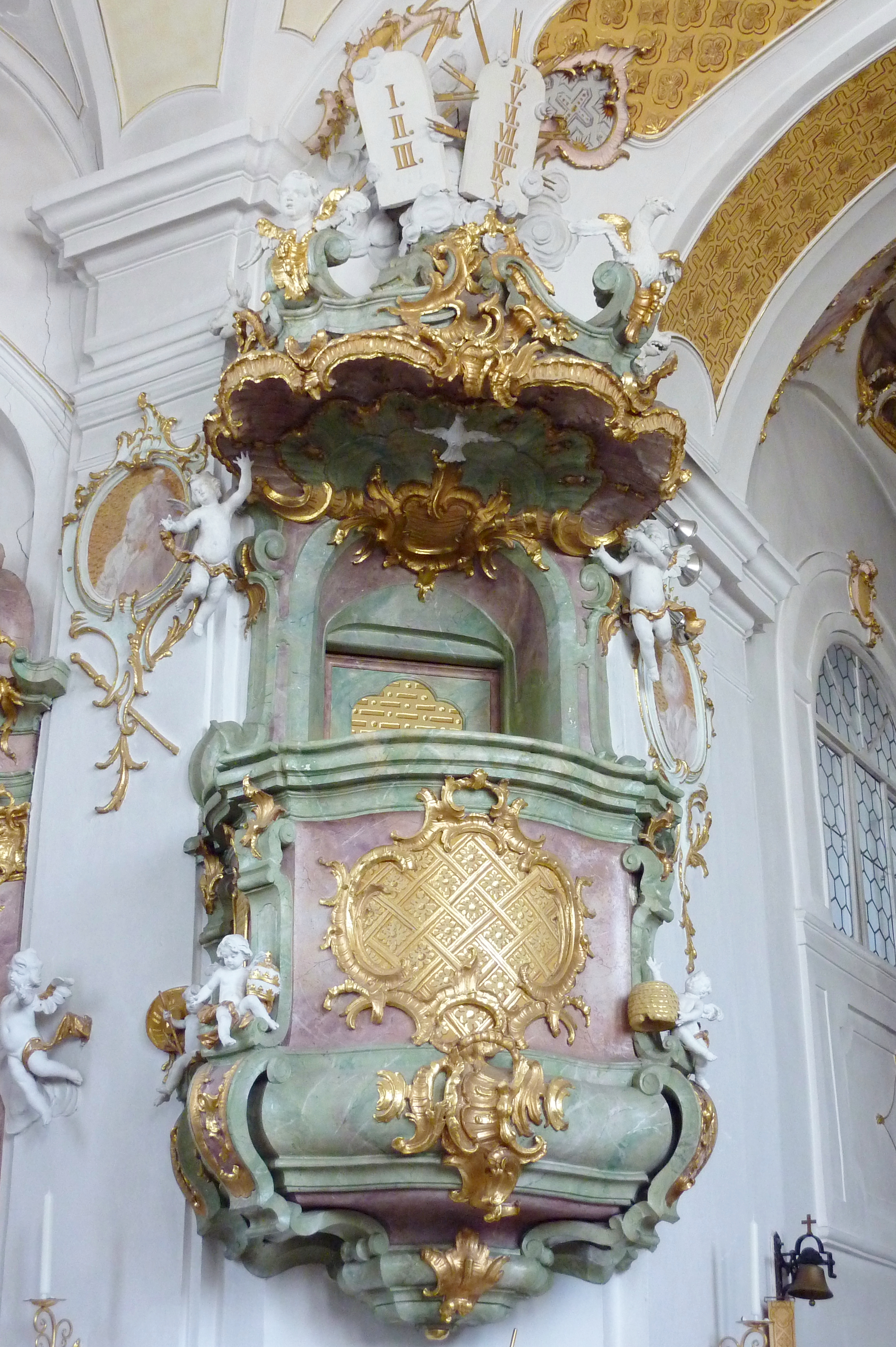 Katholische Pfarrkirche Maria Immaculata in Schwennenbach, einem Stadtteil von Höchstädt an der Donau im Landkreis Dillingen an der Donau (Bayern), Kanzel aus dem 18. Jahrhundert, am Schalldeckel Evangelistensymbole, am Korpus Engel mit den Attributen der Kirchenlehrer